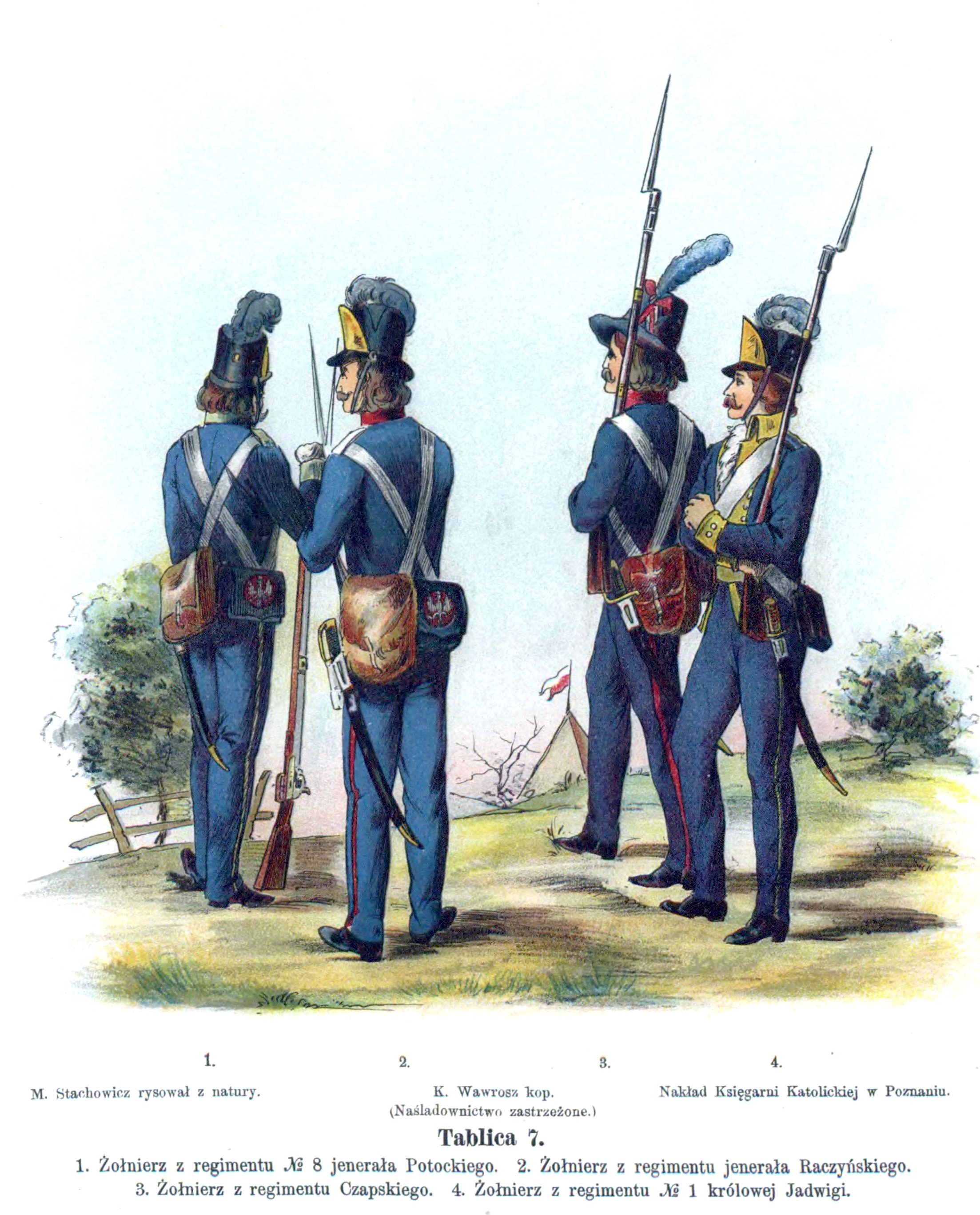 Kościuszko Uprising army